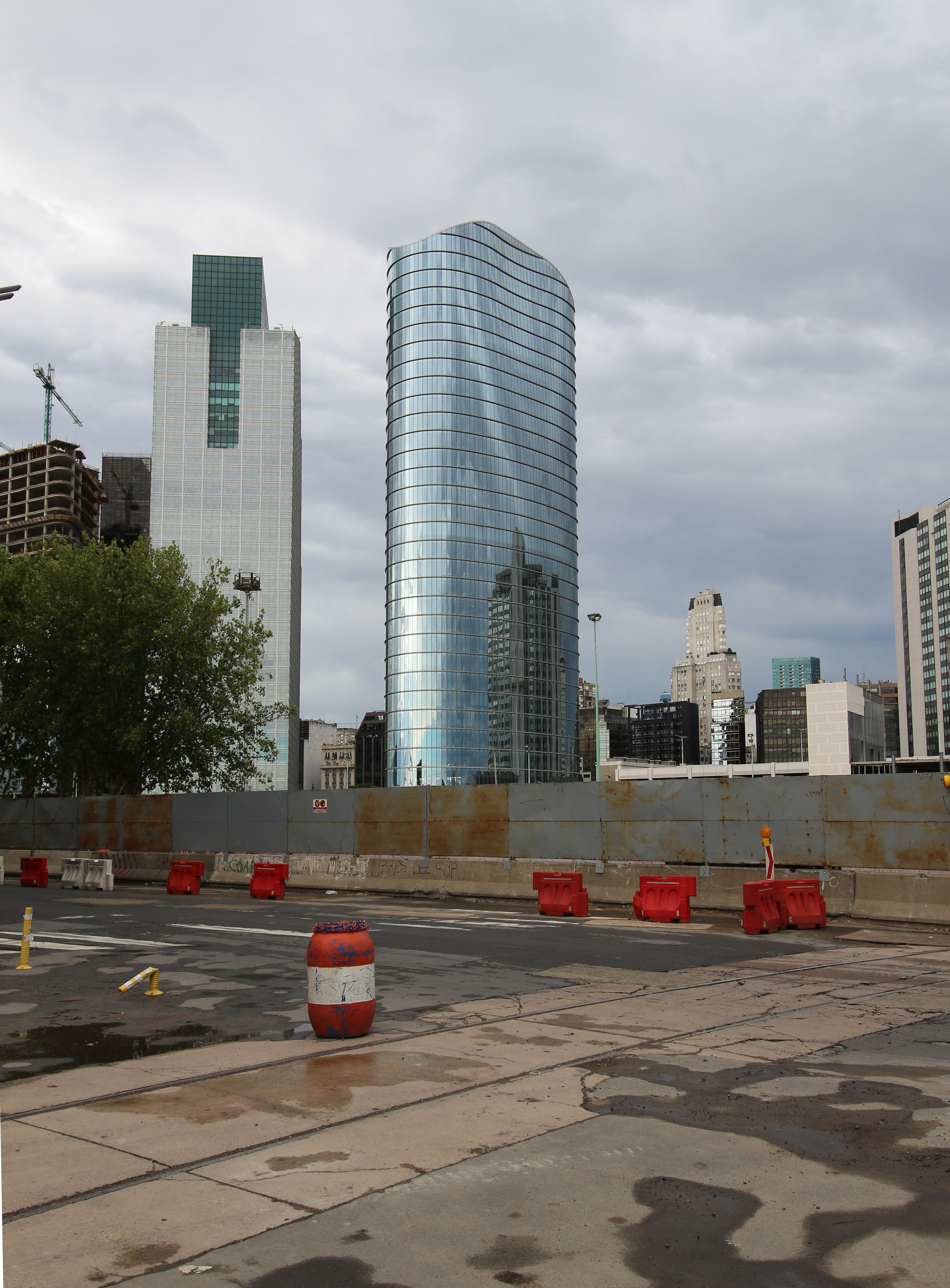 Torre Macro (César Pelli, 2013-16) in Buenos Aires, Argentinien.